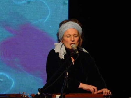 Corin Curschellas: Soloprogramm Mono, 2005